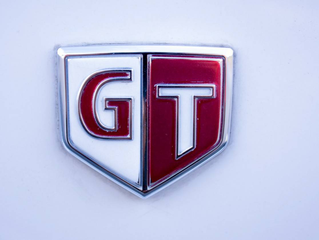 red gt batch 7/10taked